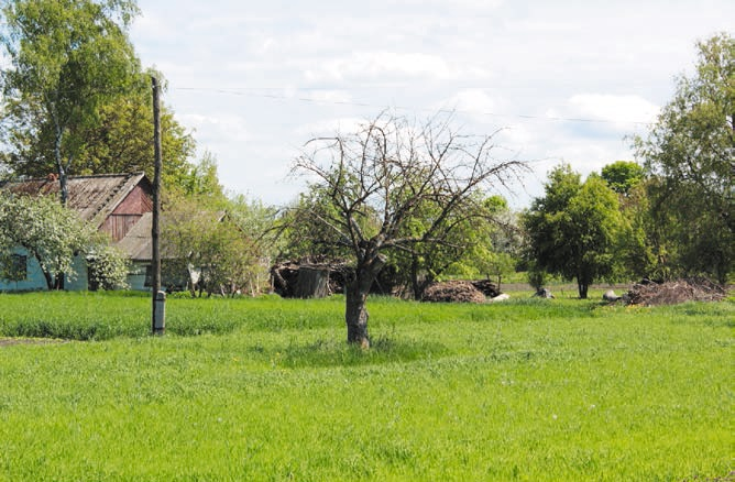 Село Новопіль. 22 квітня 2012 року. Яблуня із саду Марії Дворжицької, висаджена на початку ХХ-го століття